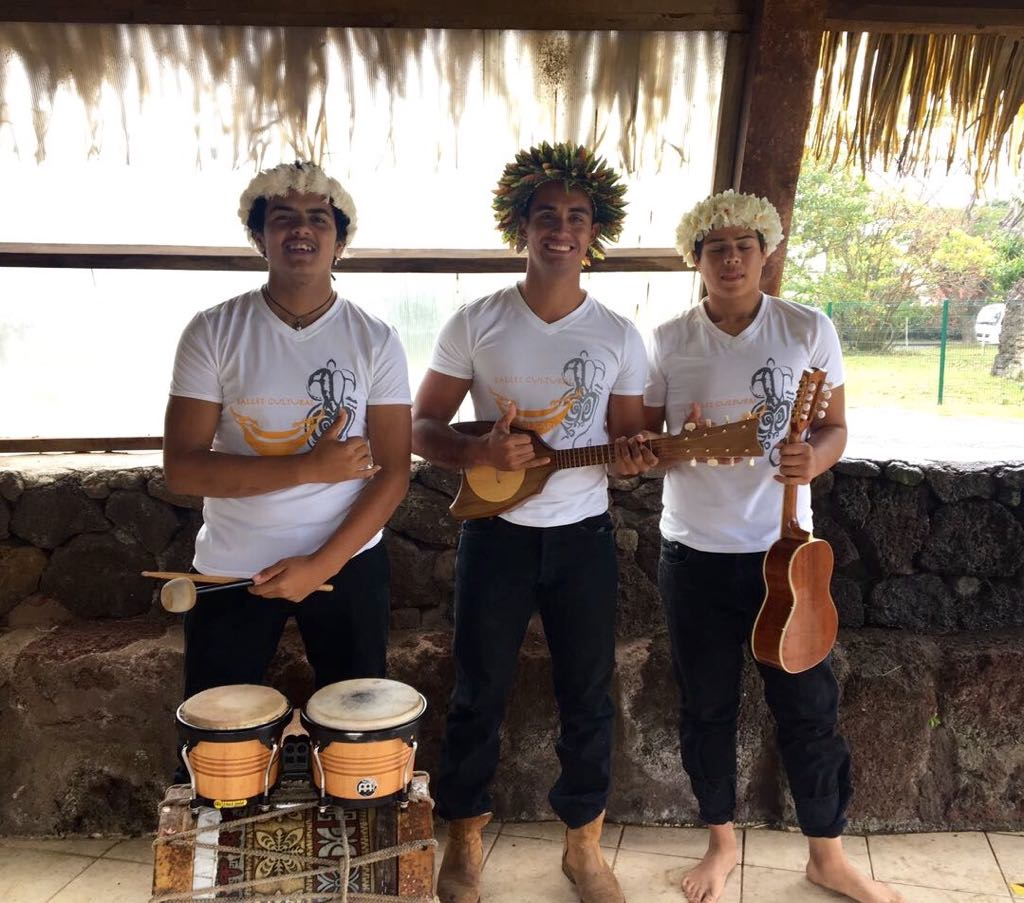 Hopumanu Rapu (en el centro) junto a estudiantes de la academia Ma'aranui